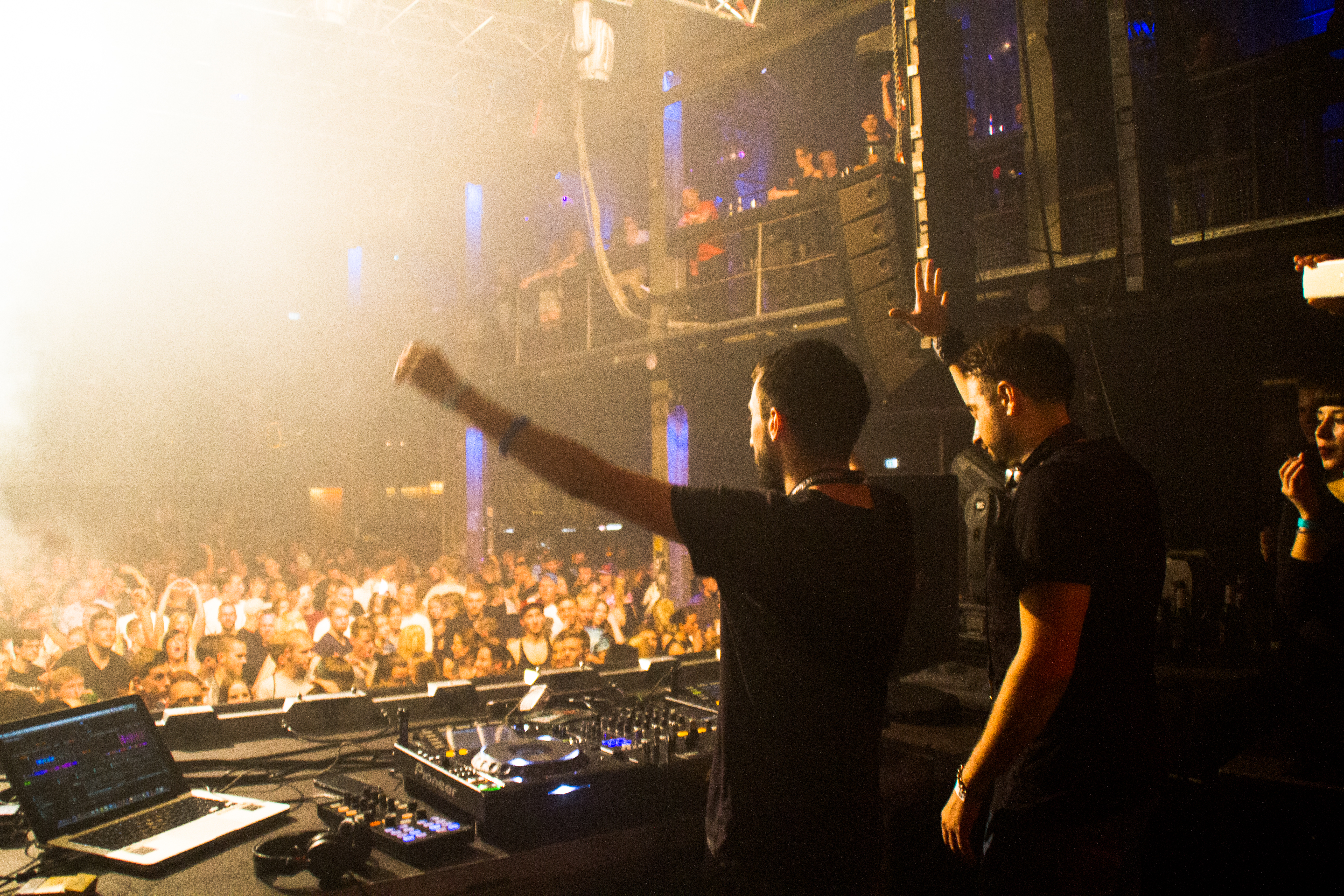 Mark Dekoda und Droplex auf der LoveBase Veranstaltungsreihe vom 2. Oktober 2015 die in der Berliner Kulturbrauerei in Berlin-Prenzlauerberg stattfand.